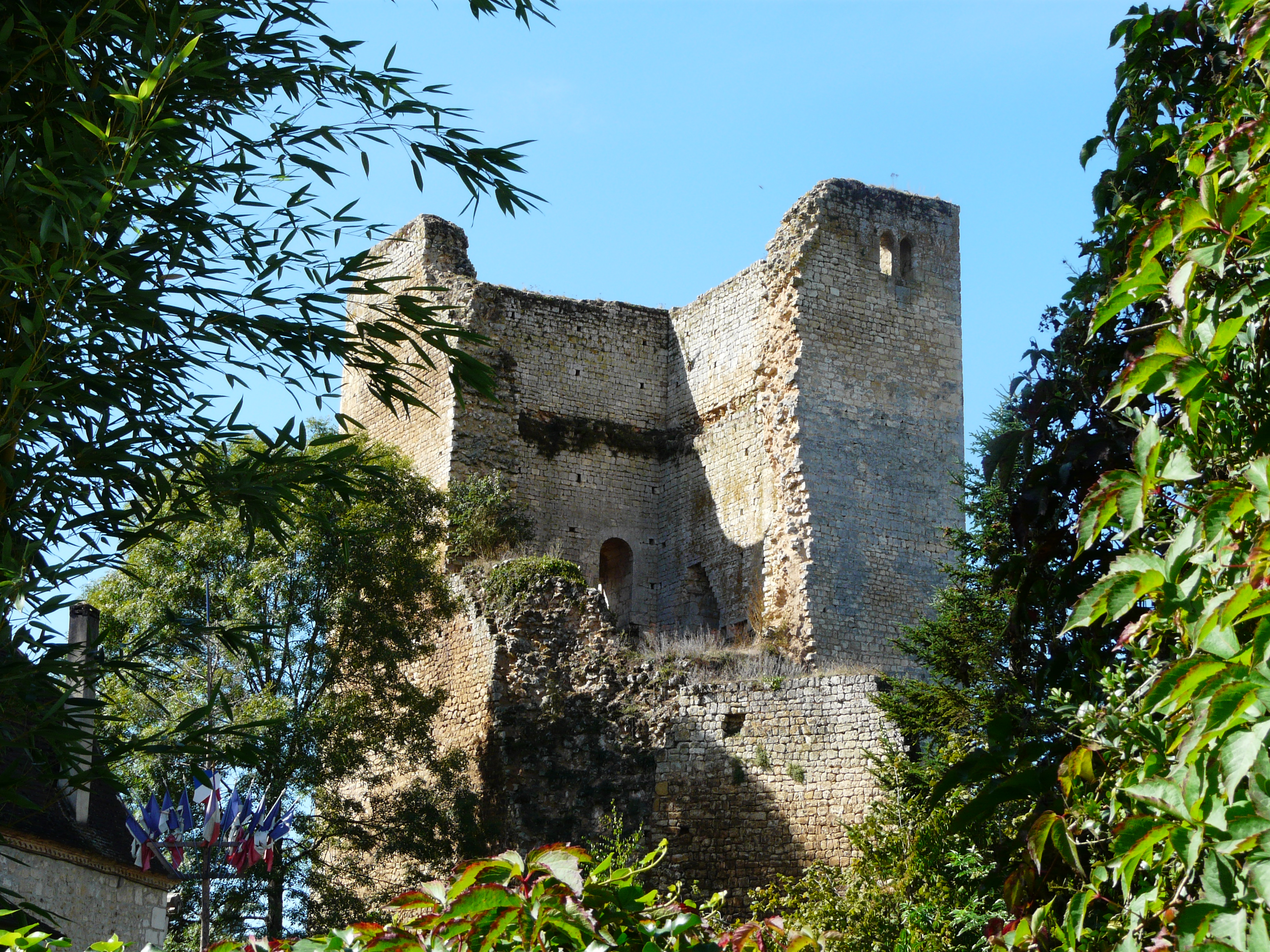 Les ruines du donjon du château de Clérans, Cause-de-Clérans, Dordogne, France.